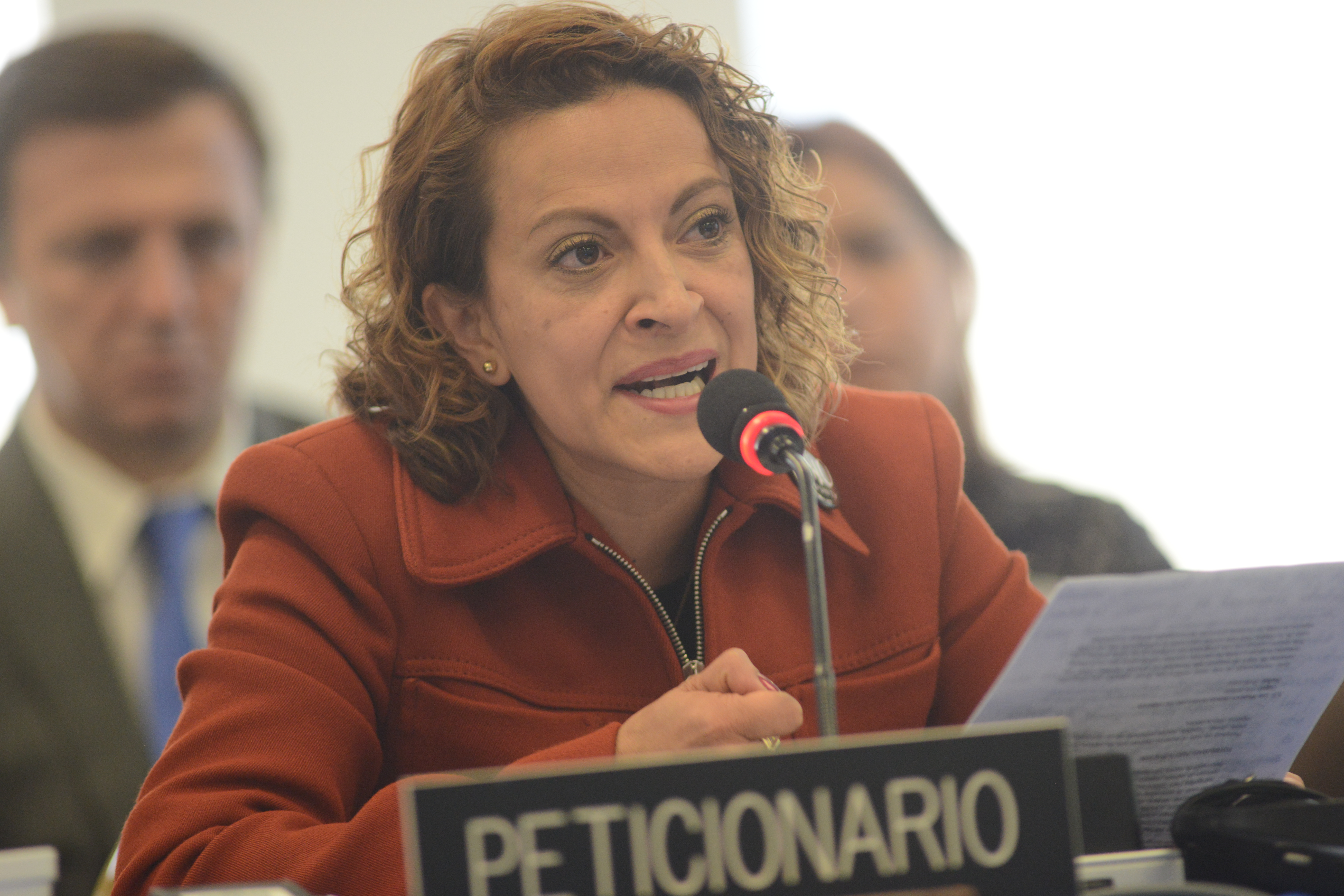 Jineth Bedoya Lima como peticionaria en el 157 Período Ordinario de Sesiones de la Comisión Interamericana de Derechos Humanos.